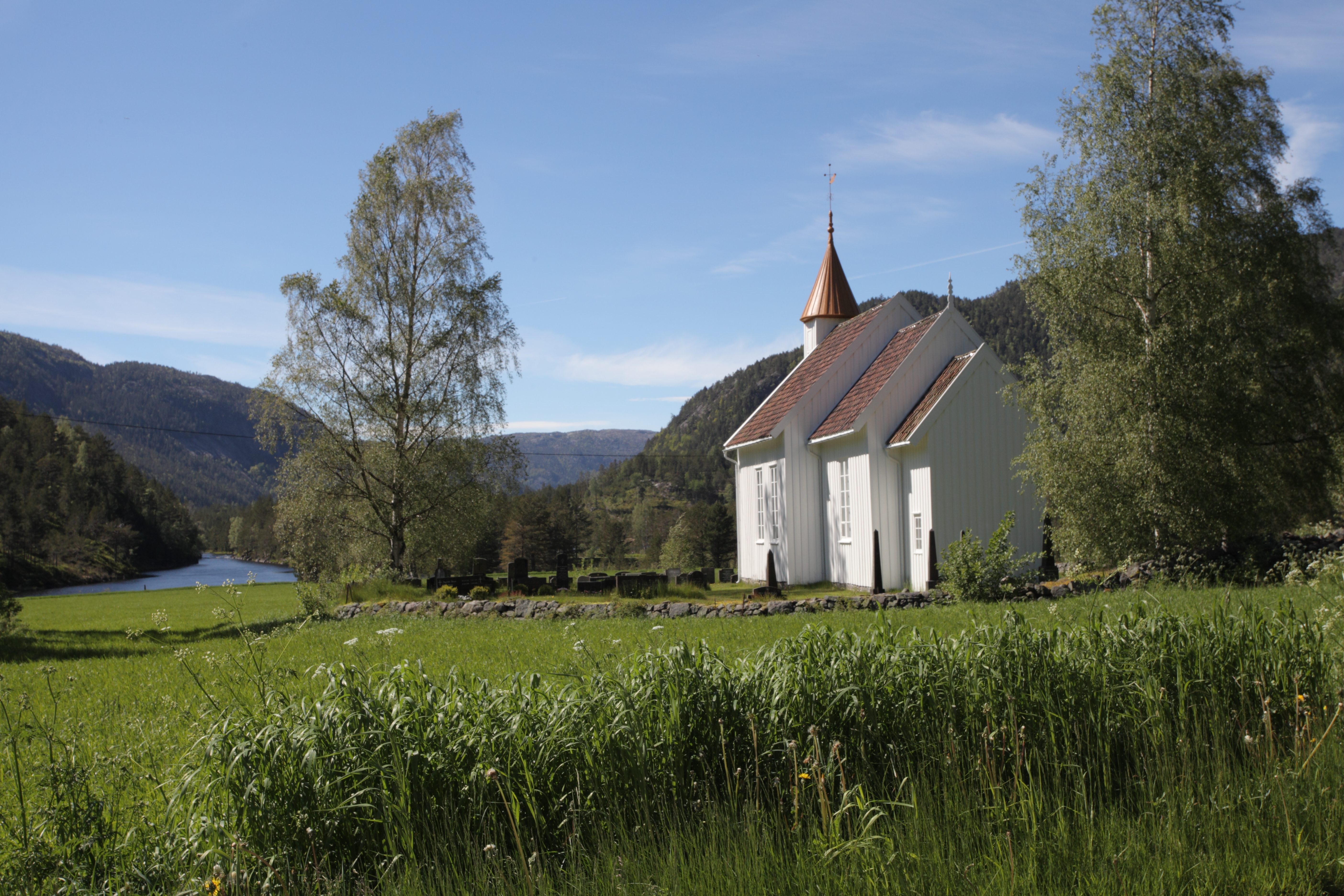 Kirken på Hillestad i Tovdal. Tovdalselva i bakgrunnen.